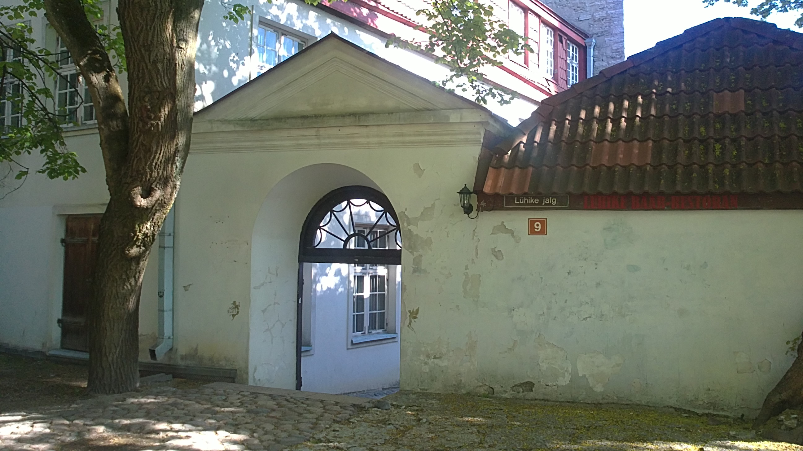 Tallinna vanalinn, Lühike jalg 9, värav Taani Kuninga aeda, vaade Taani Kuninga aiast